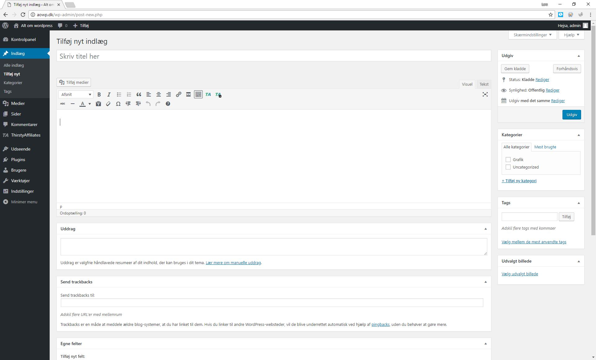 Den visuelle teksteditor i wordpress, hvor der kan skrives nye blogindlæg.